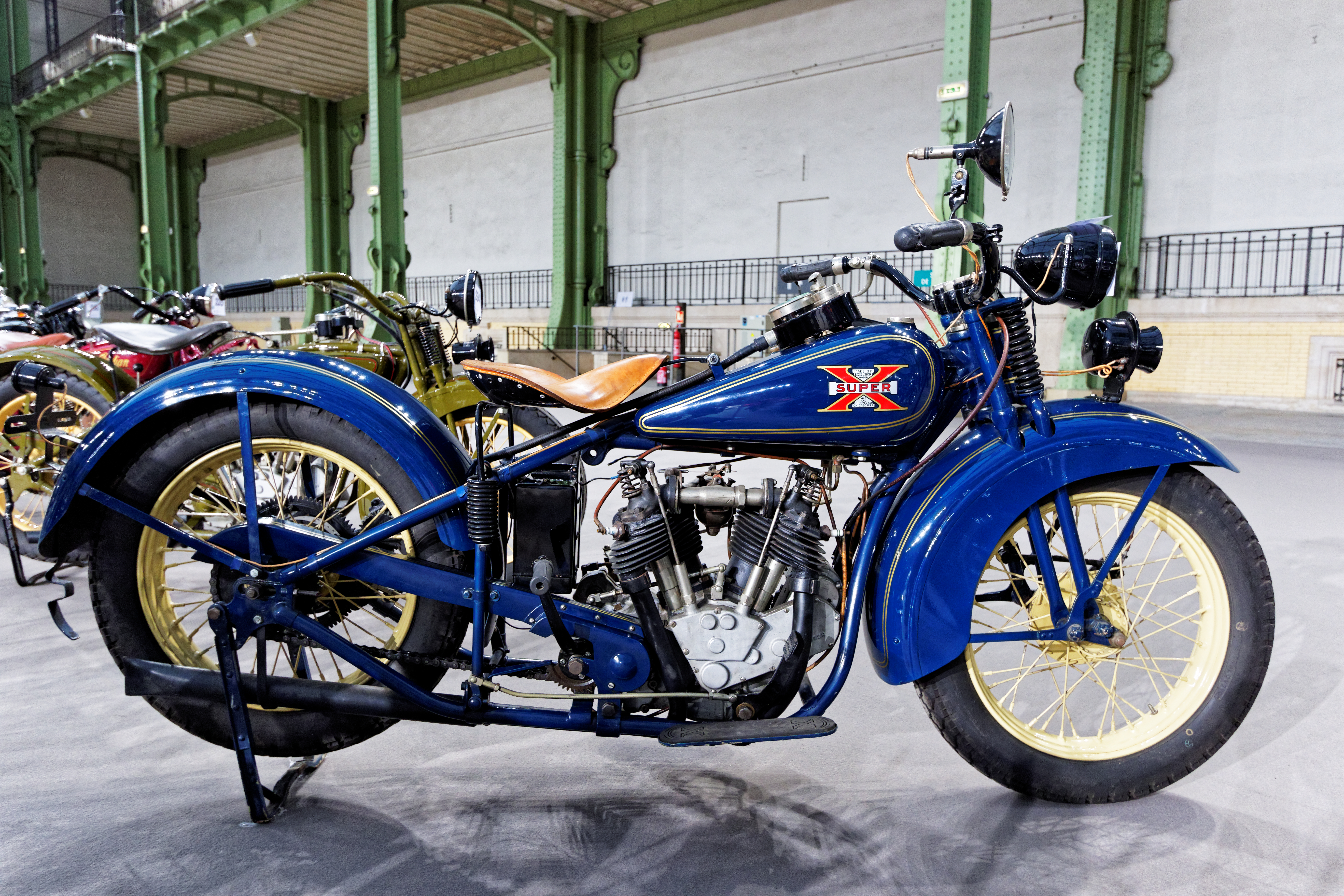 Un des véhicules présenté lors de la vente aux enchères Bonhams 2016 au Grand Palais de Paris.